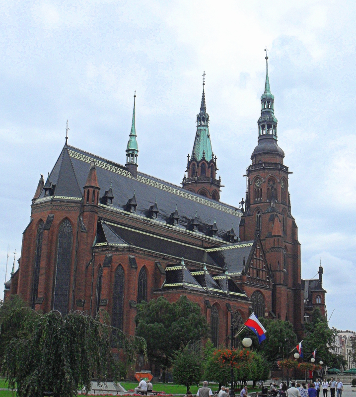 Legnica, kościół par. p.w. śś. Piotra i Pawła, ob. katedra, 1333-1390, 1863-1894